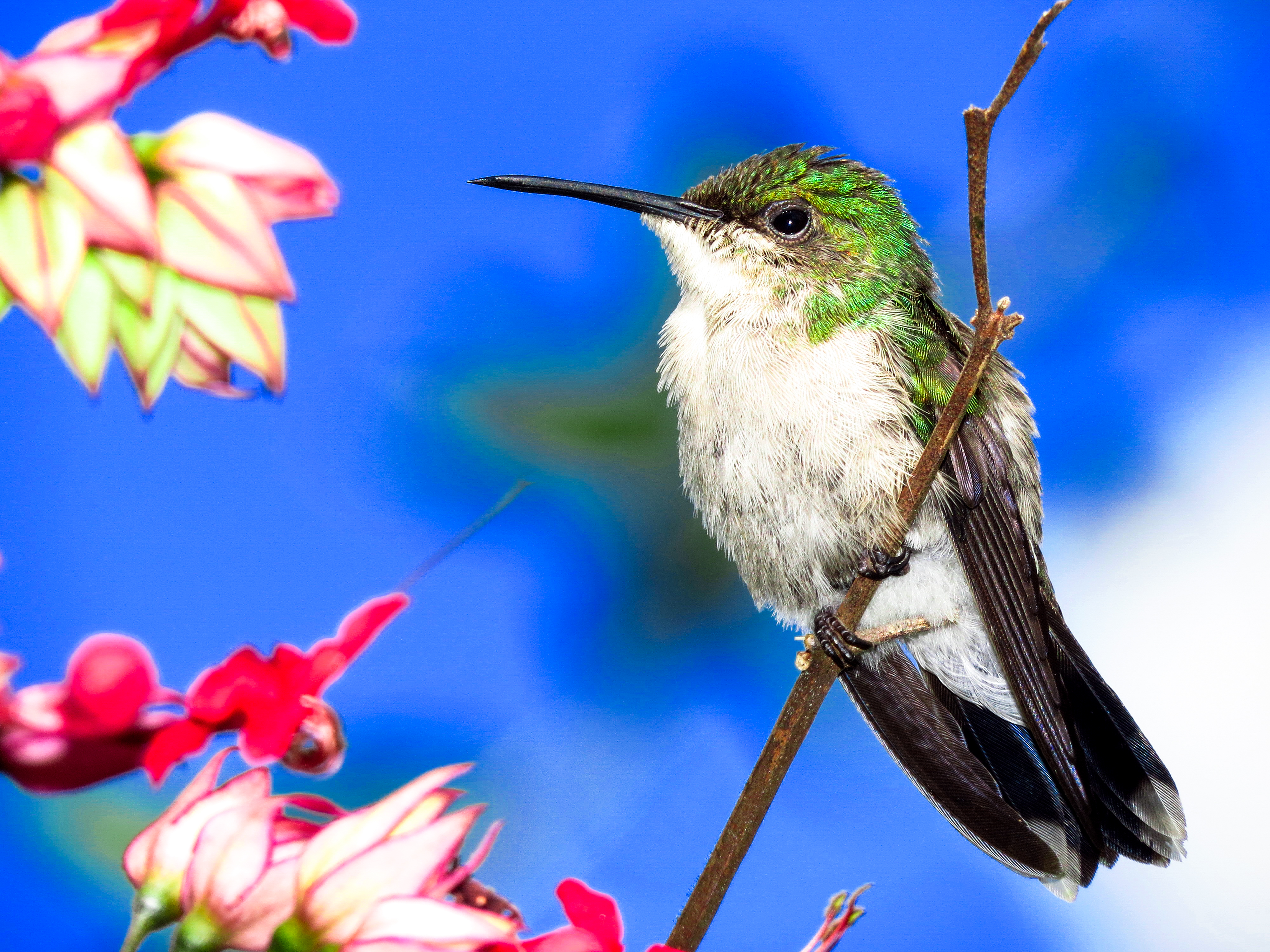 Beija flor tesoura verde (fêmea).Thalurania furcata.